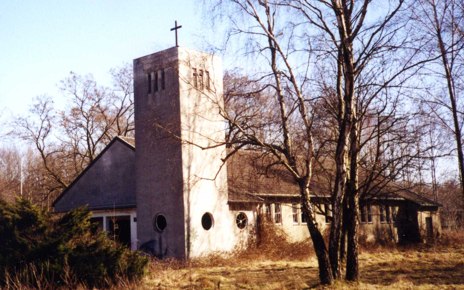 Ehemalige Kirche des ehemaligen belgischen "Camp Astrid" im Propsteier Wald bei Eschweiler